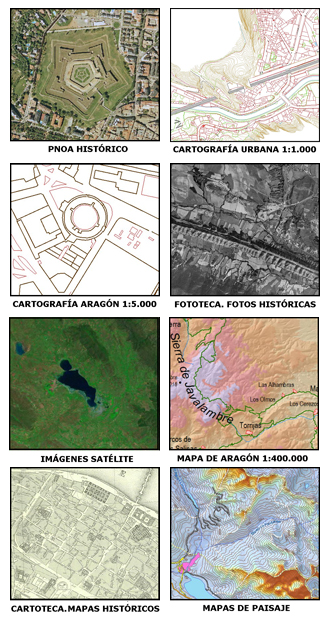 Productos cartográficos